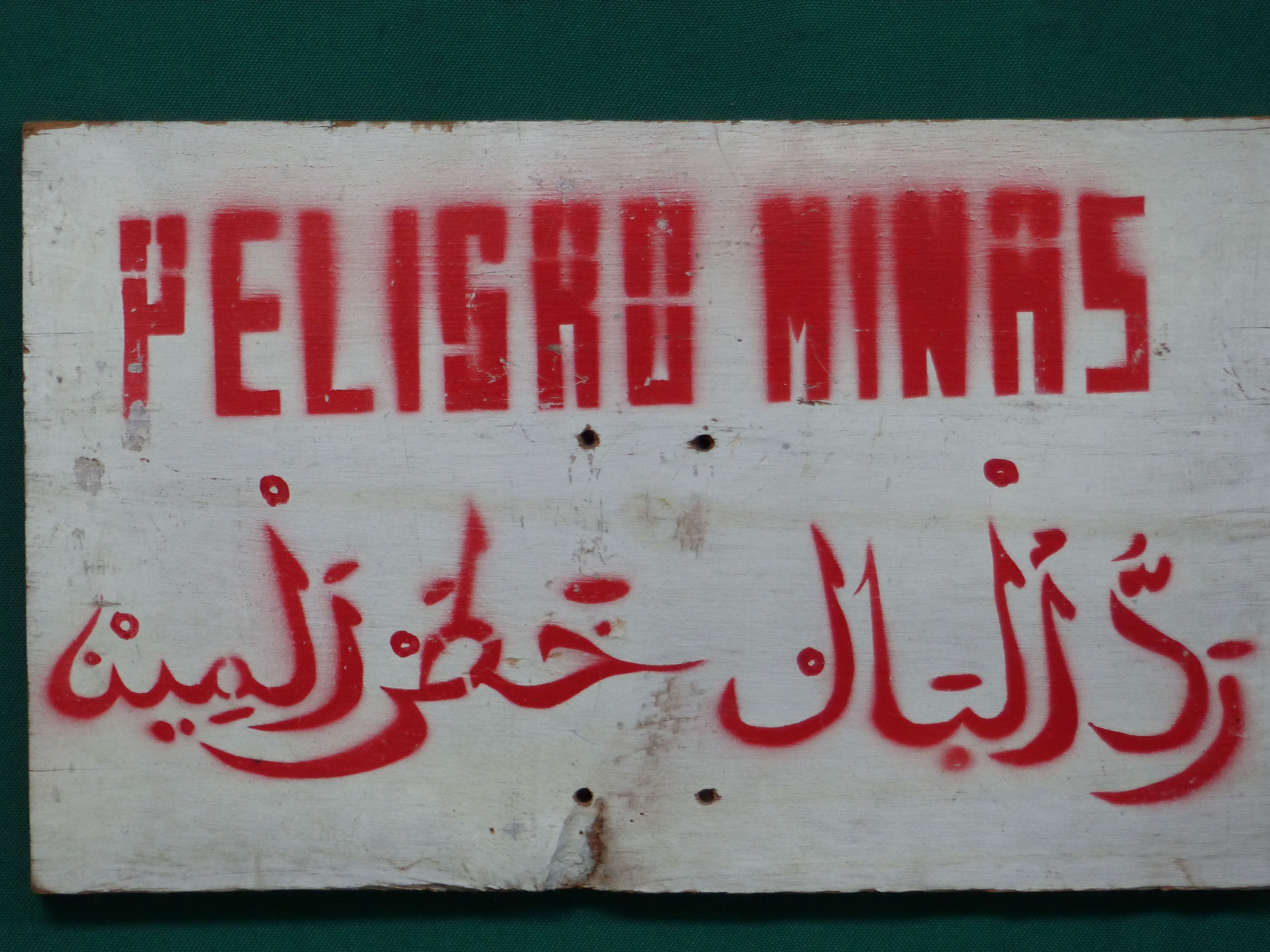 Cartel campo minas marcha verde